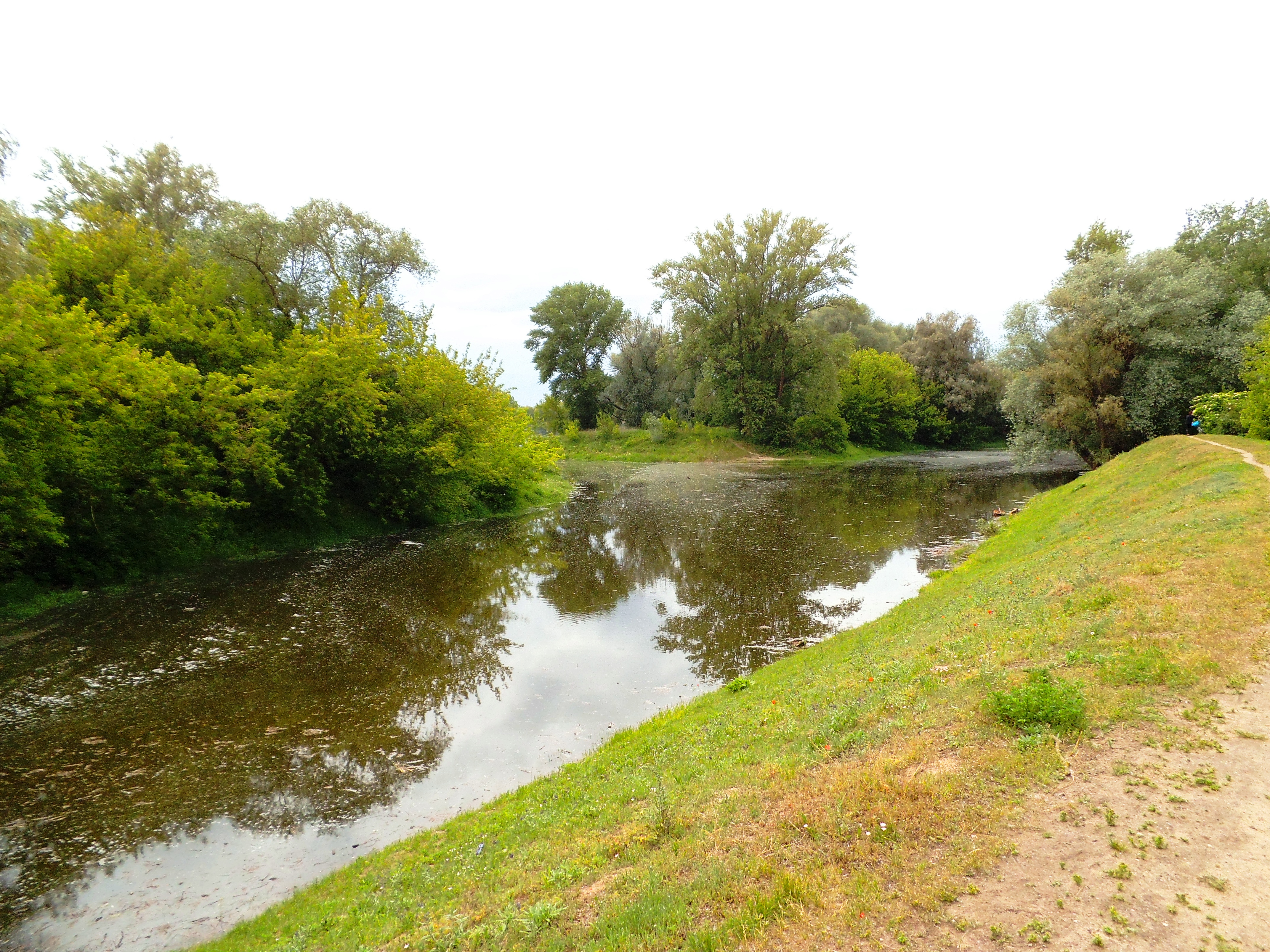 Dawna przystań AZS w Toruniu1